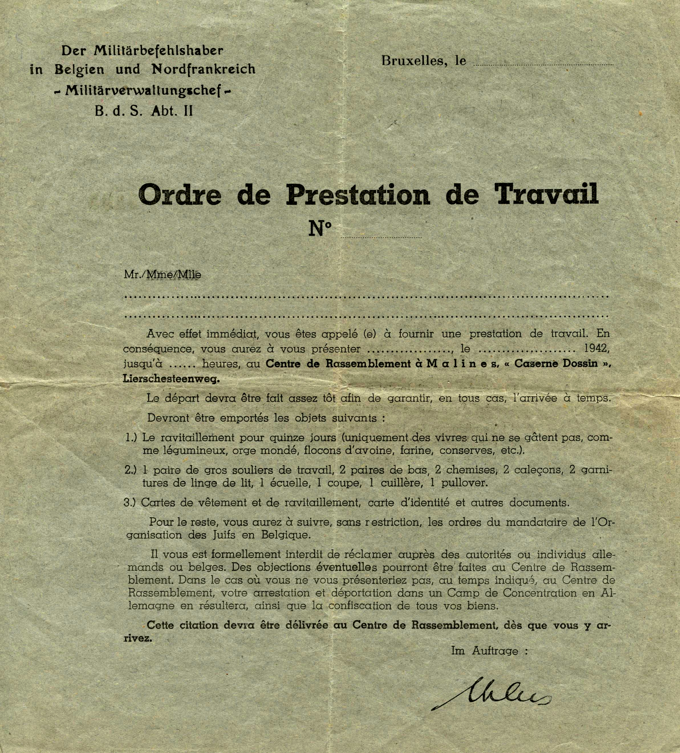 "Convocation à Malines" (Ordre de prestation de travail ou Arbeitseinsatzbefehl), subterfuge employé par les Nazis pour la déportation des Juifs de Belgique